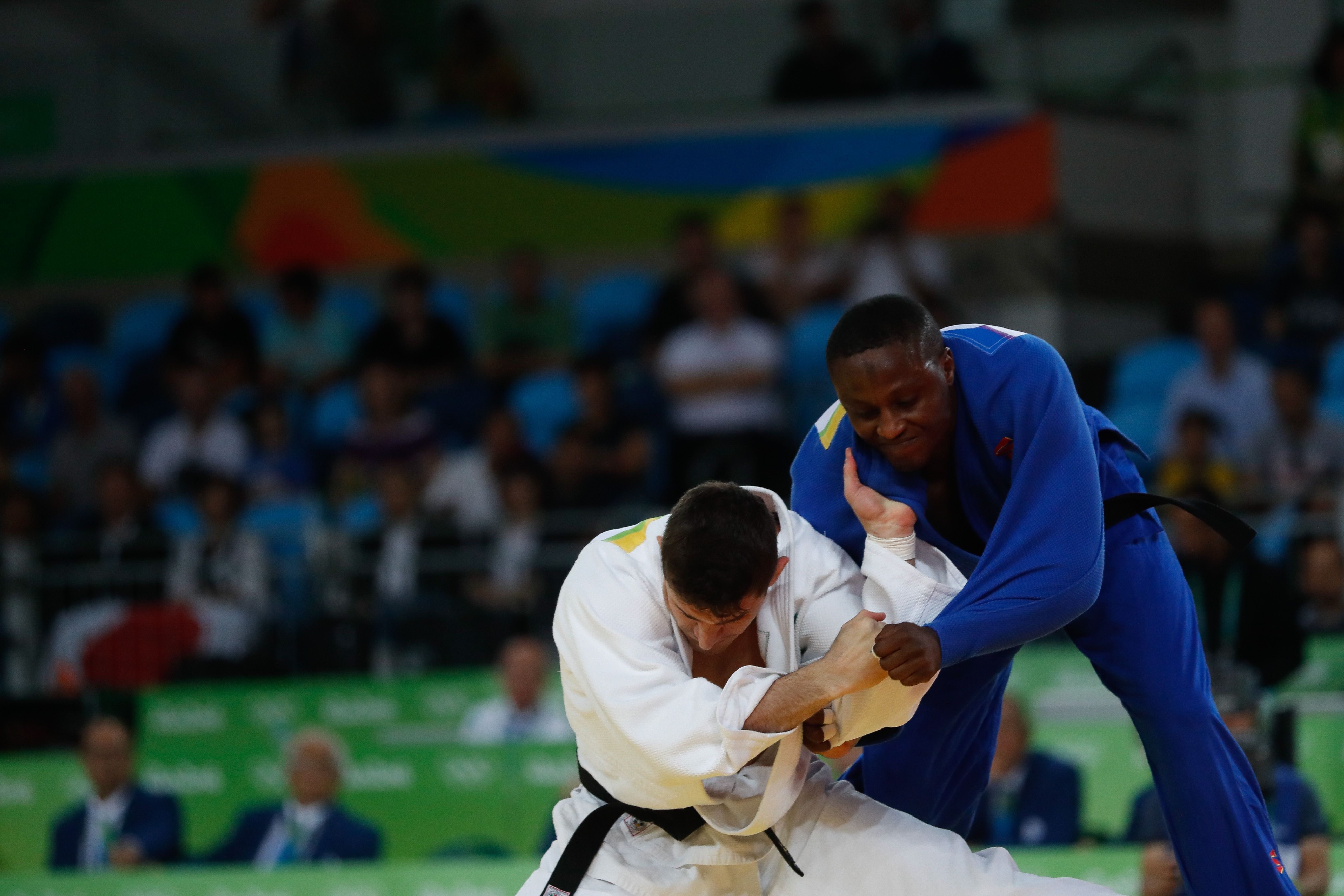 Judô na Arena Carioca dos Jogos Olímpicos Rio 2016. Rio de Janeiro - Victor Penalber, do Brasil, vence Marlon August, de Moçambique, na categoria masculina 81kg do Judô na Arena Carioca dos Jogos Olí­mpicos Rio 2016.